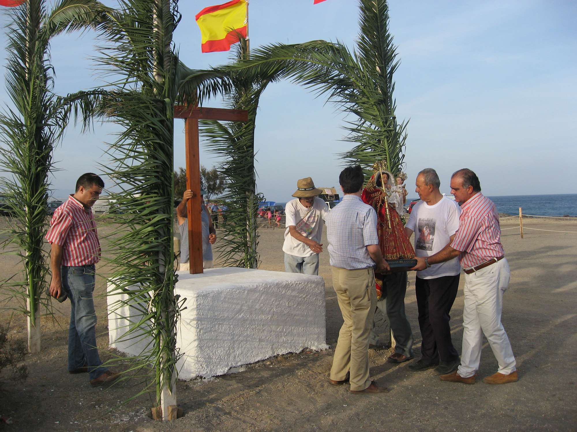 El Socorro, Güímar, Canarias